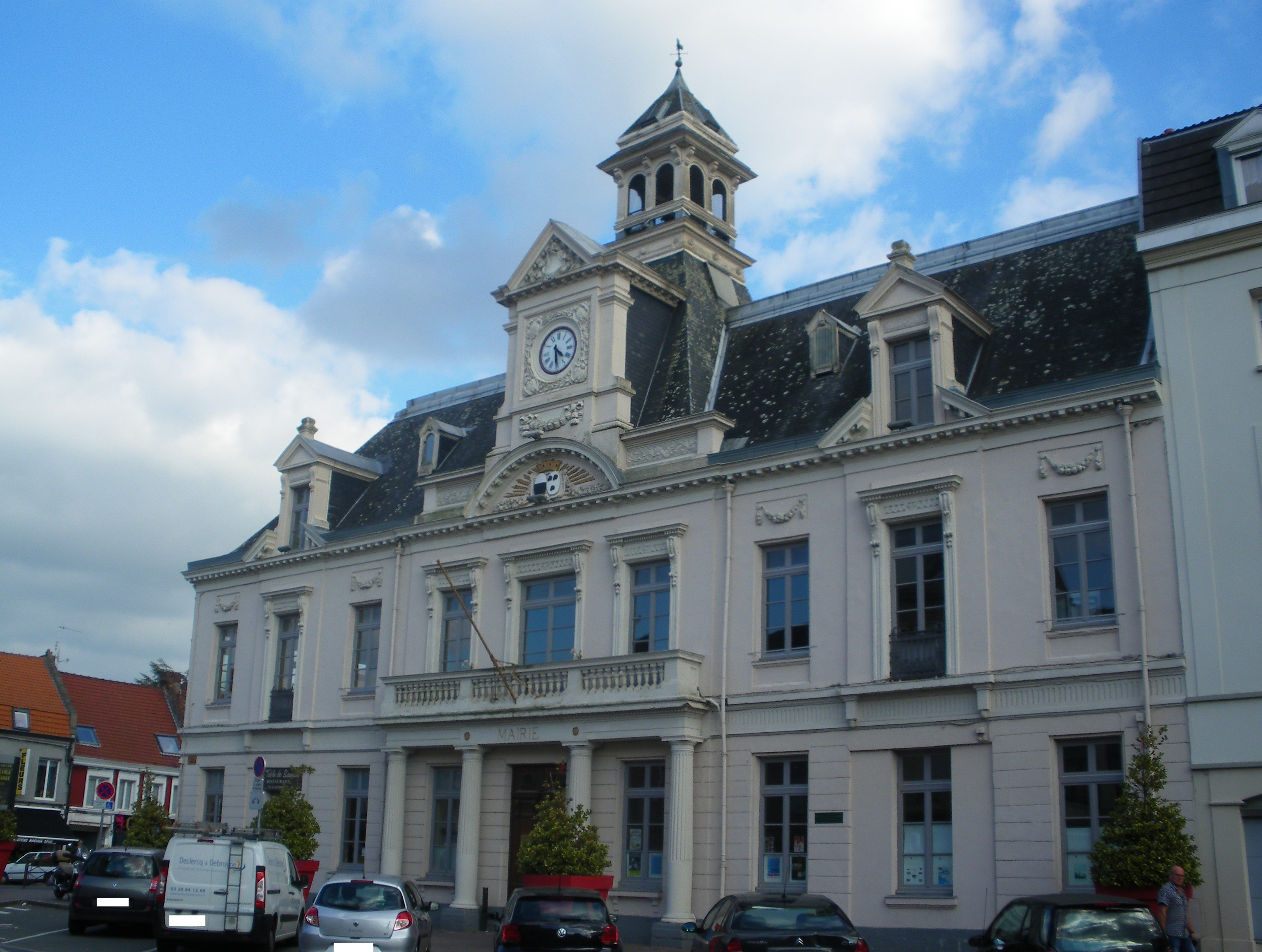 Vue de l'hôtel de ville de Lannoy dans le Nord.